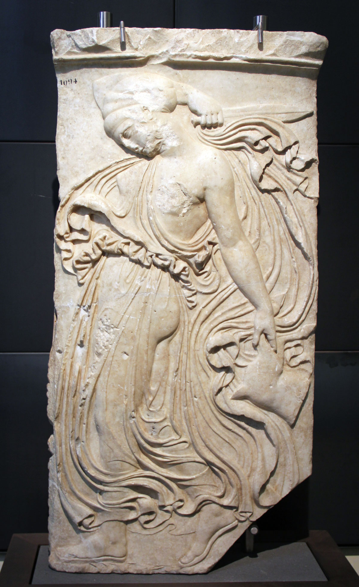 Bacchante. Copie d'un original grec du IVe siècle. Musée du Capitole. Rome